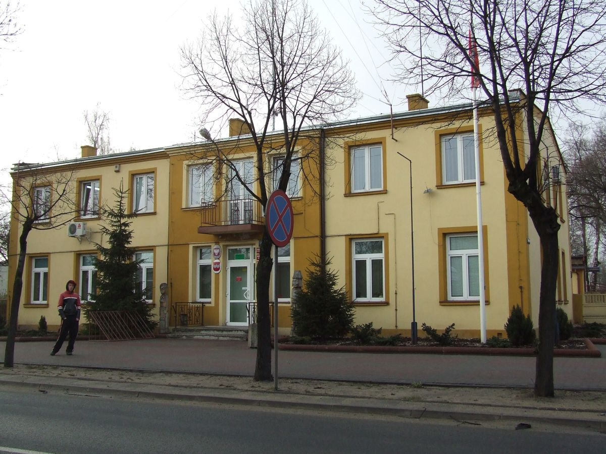 Krośniewice urząd miasta